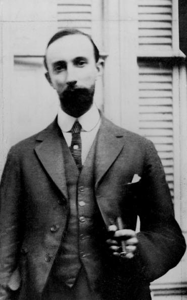 Jenaro Prieto, autor de Pluma en ristre, Un muerto de mal criterio y El socio, fue un destacado escritor y periodista chileno.